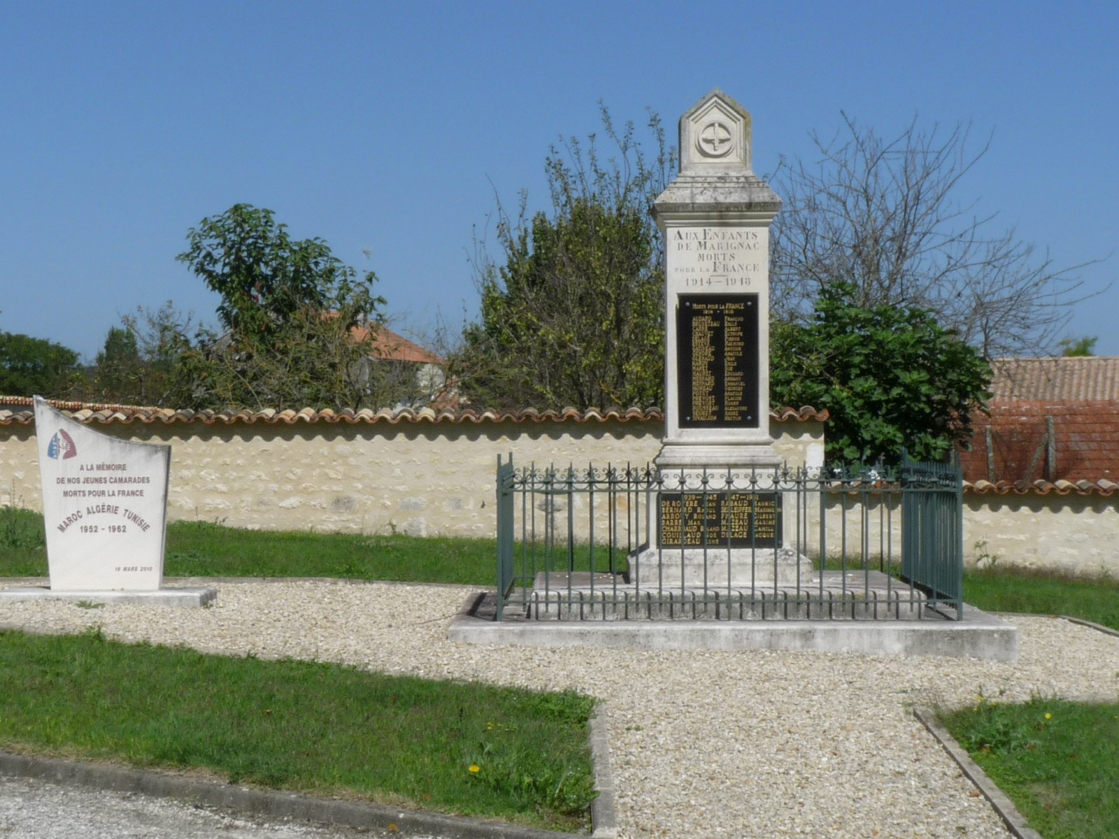 Monument aux morts, Marignac, Charente-Maritime, France